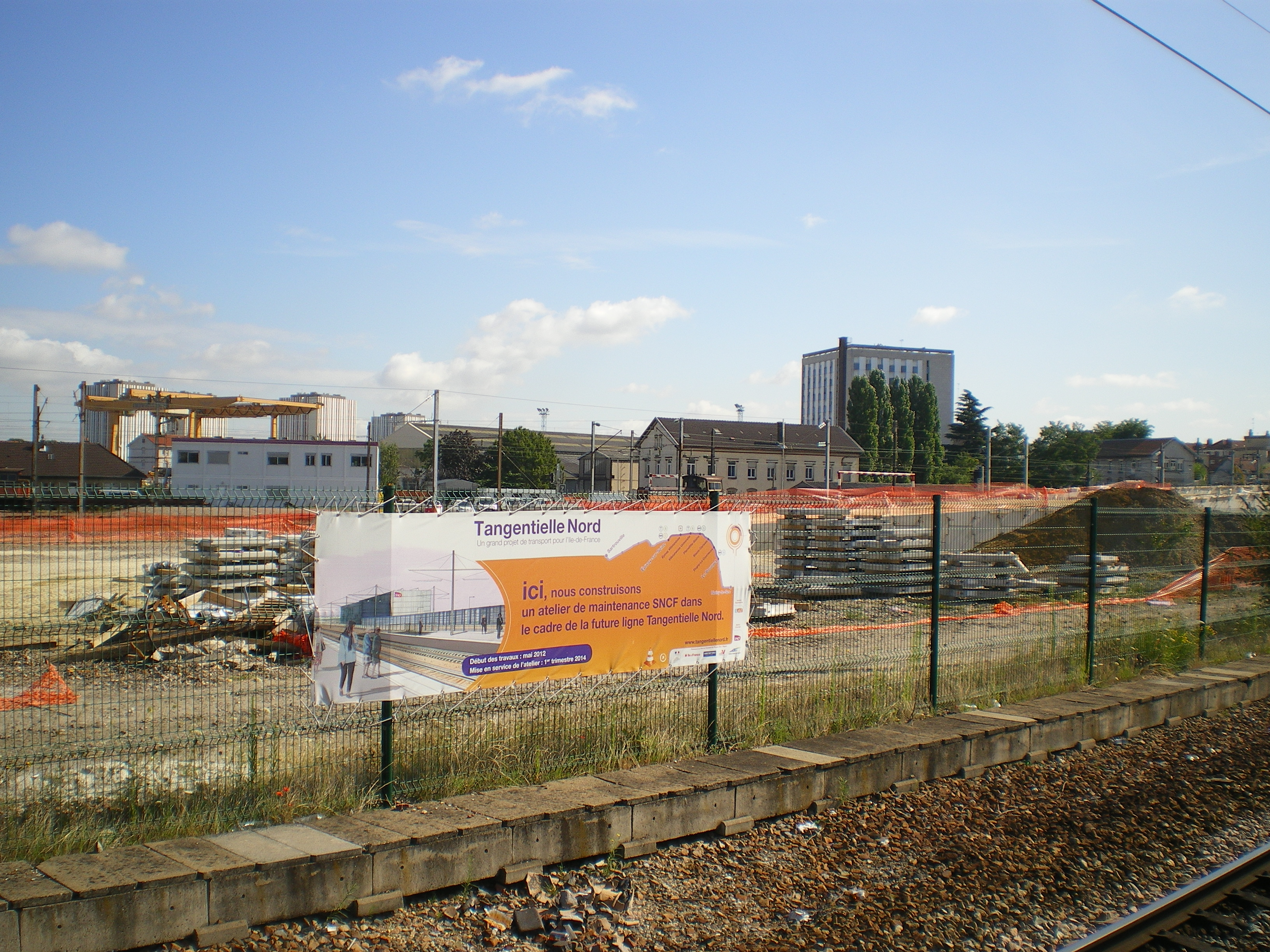 Tangentielle Nord - Noisy-le-Sec - Chantier de l'atelier d'entretien